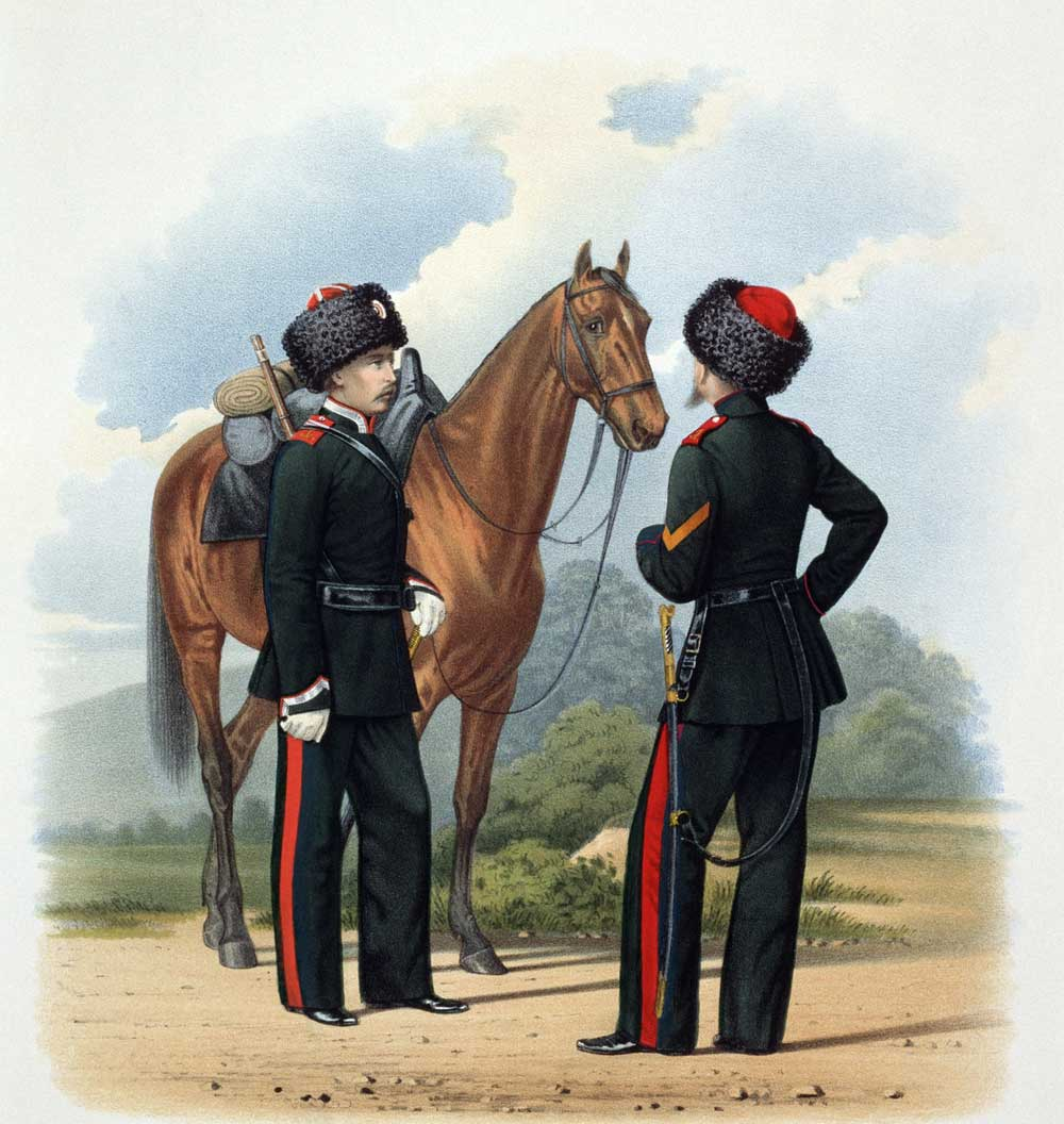 Сибирское и Семиреченское Казачьи войска, 21 октября 1867. (Парадная и праздничная формы).